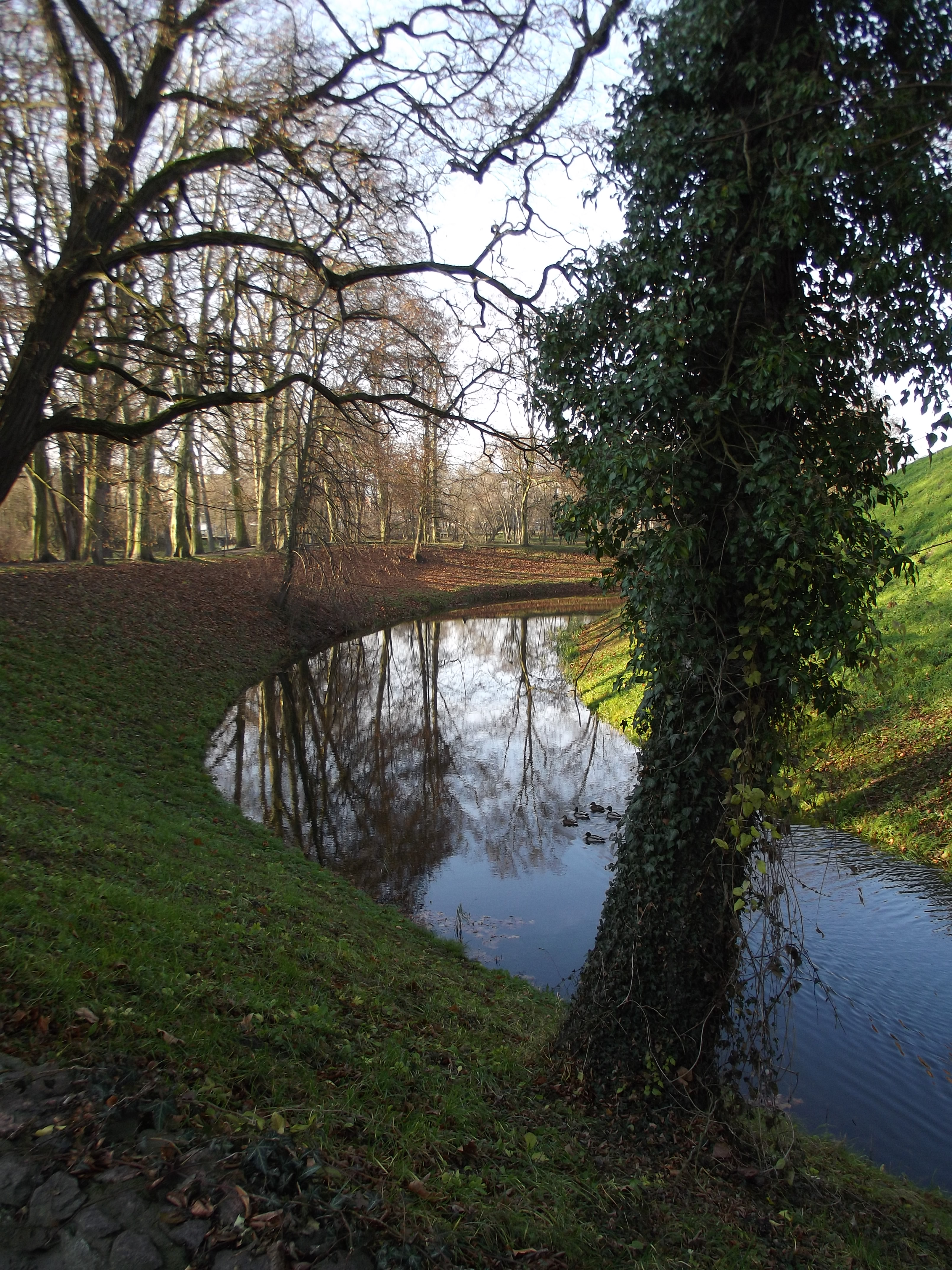 Fosa zamkowa wraz z zachowanym zewnętrznym wałem dawnego grodu